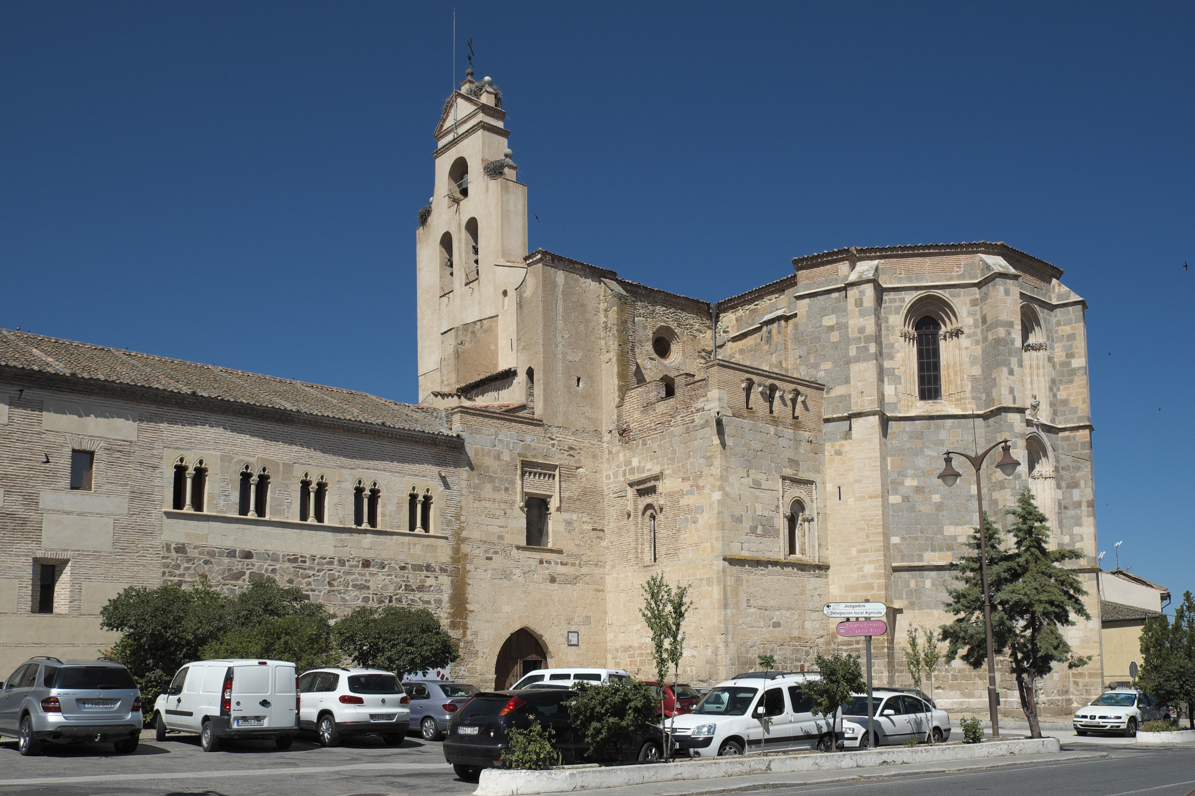 Ehemaliges Dominikanerkloster in Santa María la Real de Nieva in der Provinz Segovia (Kastilien-León/Spanien), Kirche Nuestra Señora de la Soterraña und Klostergebäude